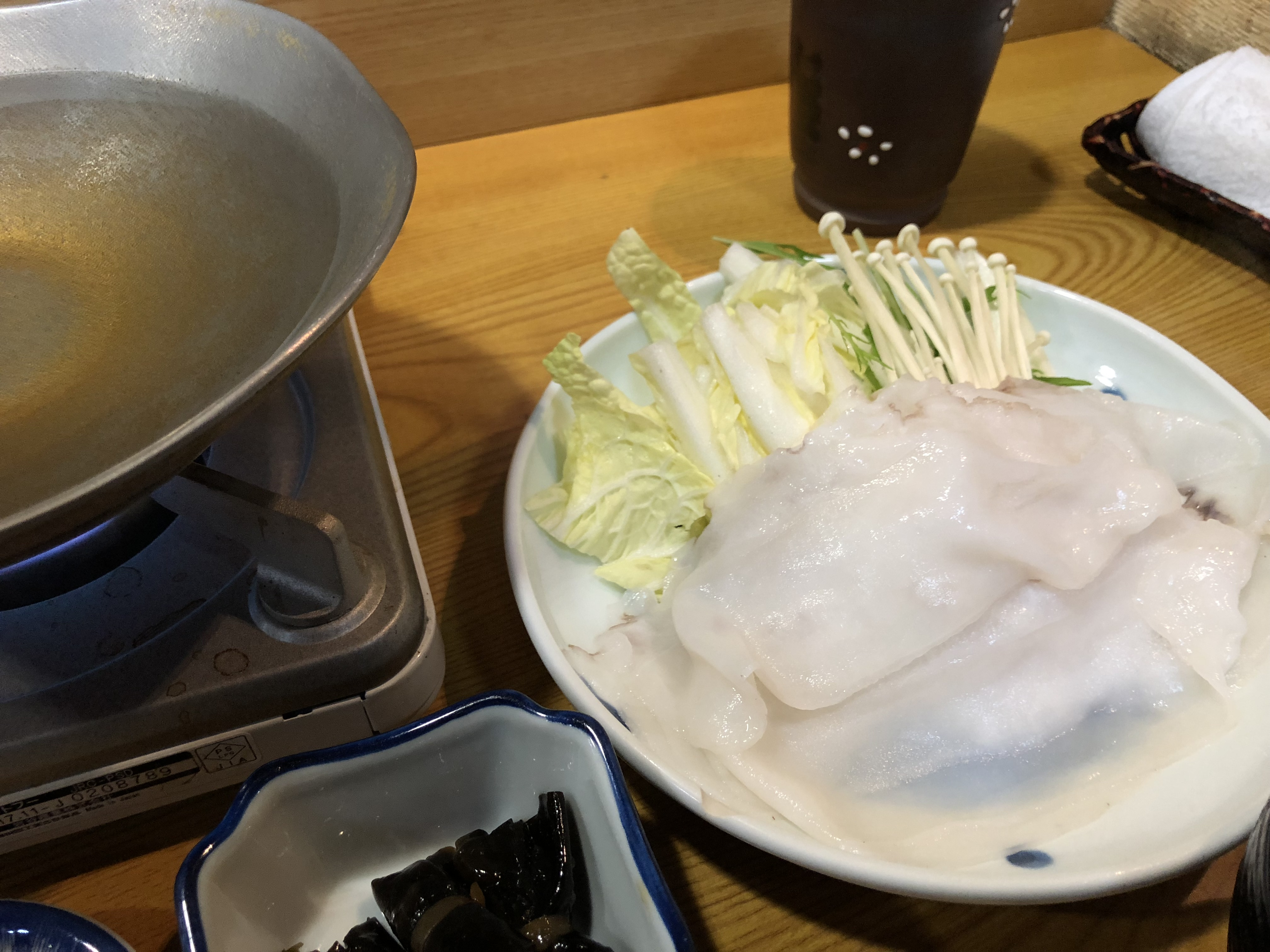 タコしゃぶ。稚内市の飲食店にて。